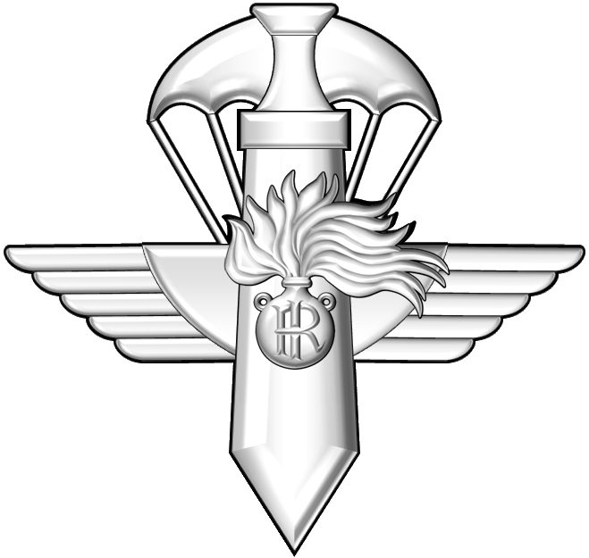 Stemma G.I.S.